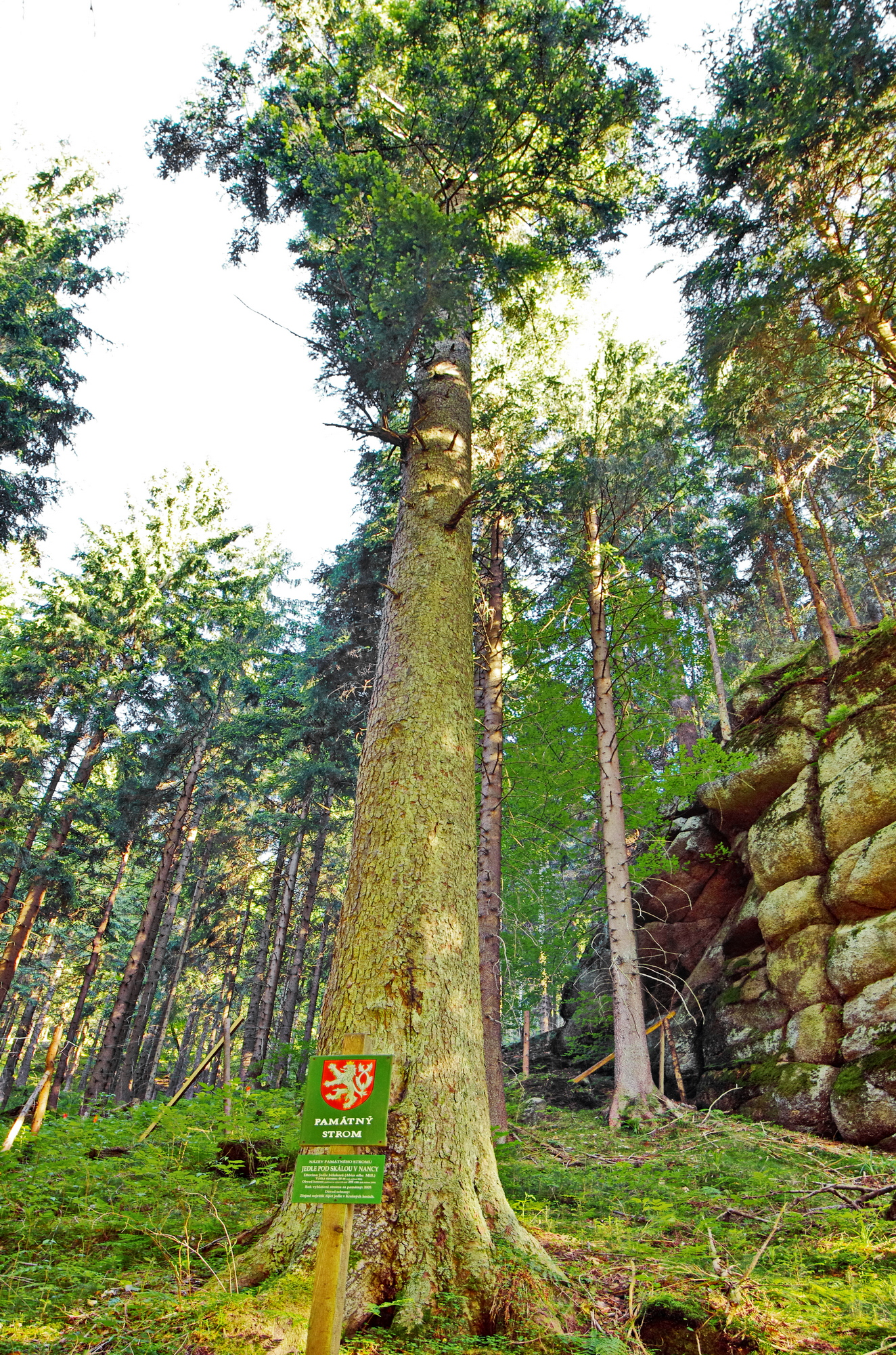 památný strom - Jedle pod skálou v Nancy - Stříbrná, okres Sokolov